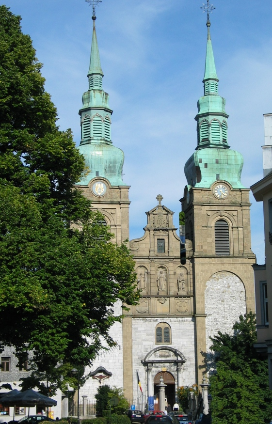 St.-Nikolaus-Kirche, Eupen